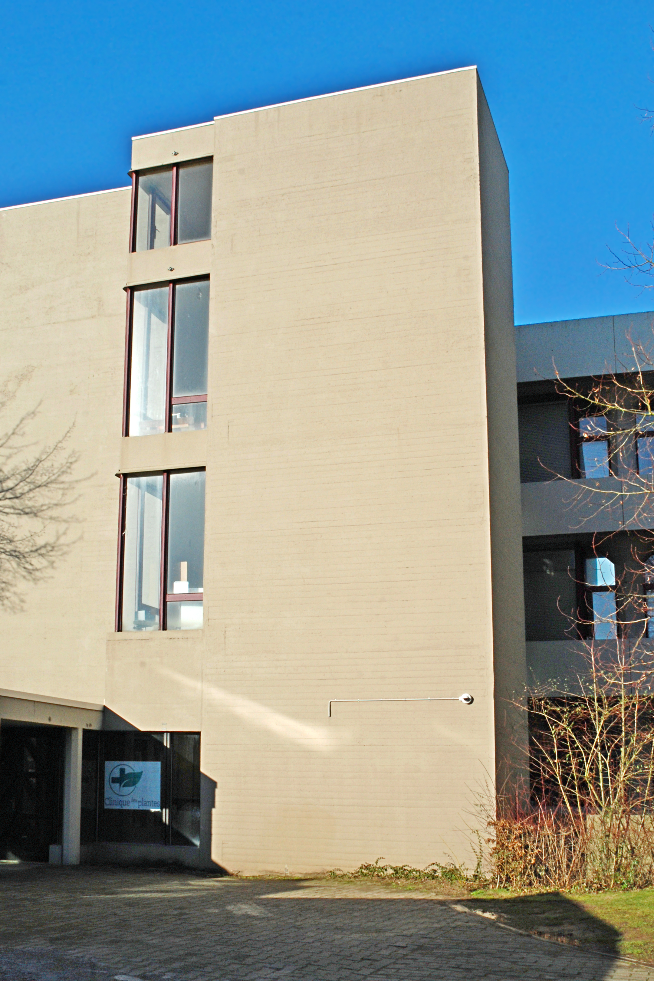 Belgique - Louvain-la-Neuve - Place Croix-du-Sud - bâtiment Kellner (architecture brutaliste, 1975) This photo of immovable heritage has been taken in the Walloon Region